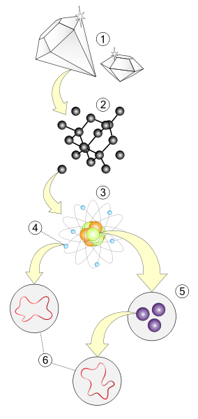 Magnificação dos leveis do Diamante.